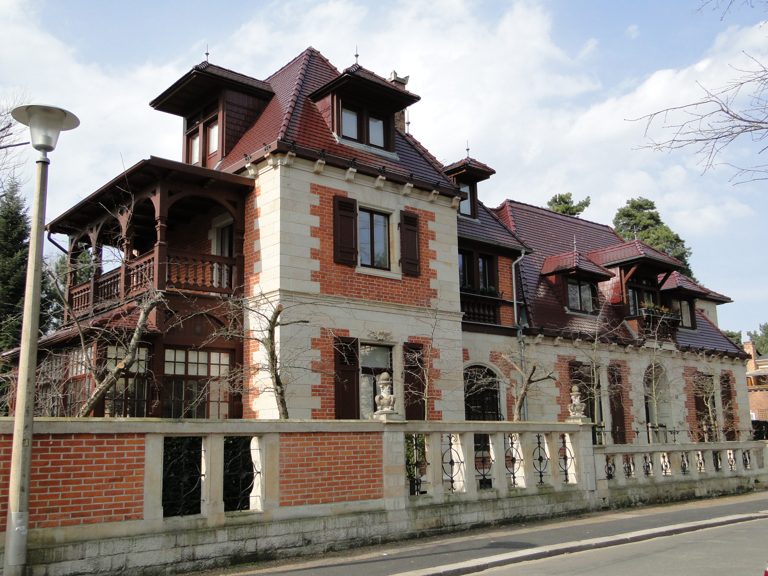 Villa Stock in Dresden-Blasewitz, Händelallee 14/16; erbaut 1870; unter Denkmalschutz